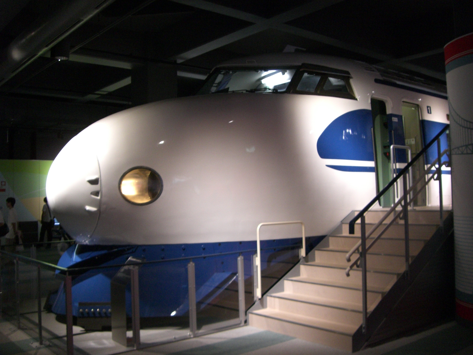 カワサキワールドに展示されている21-7038